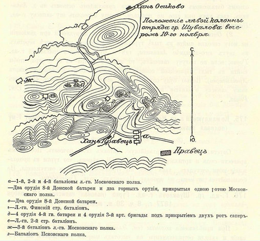 Карта на укрепленията при Правец от 10 ноември 1877 г.